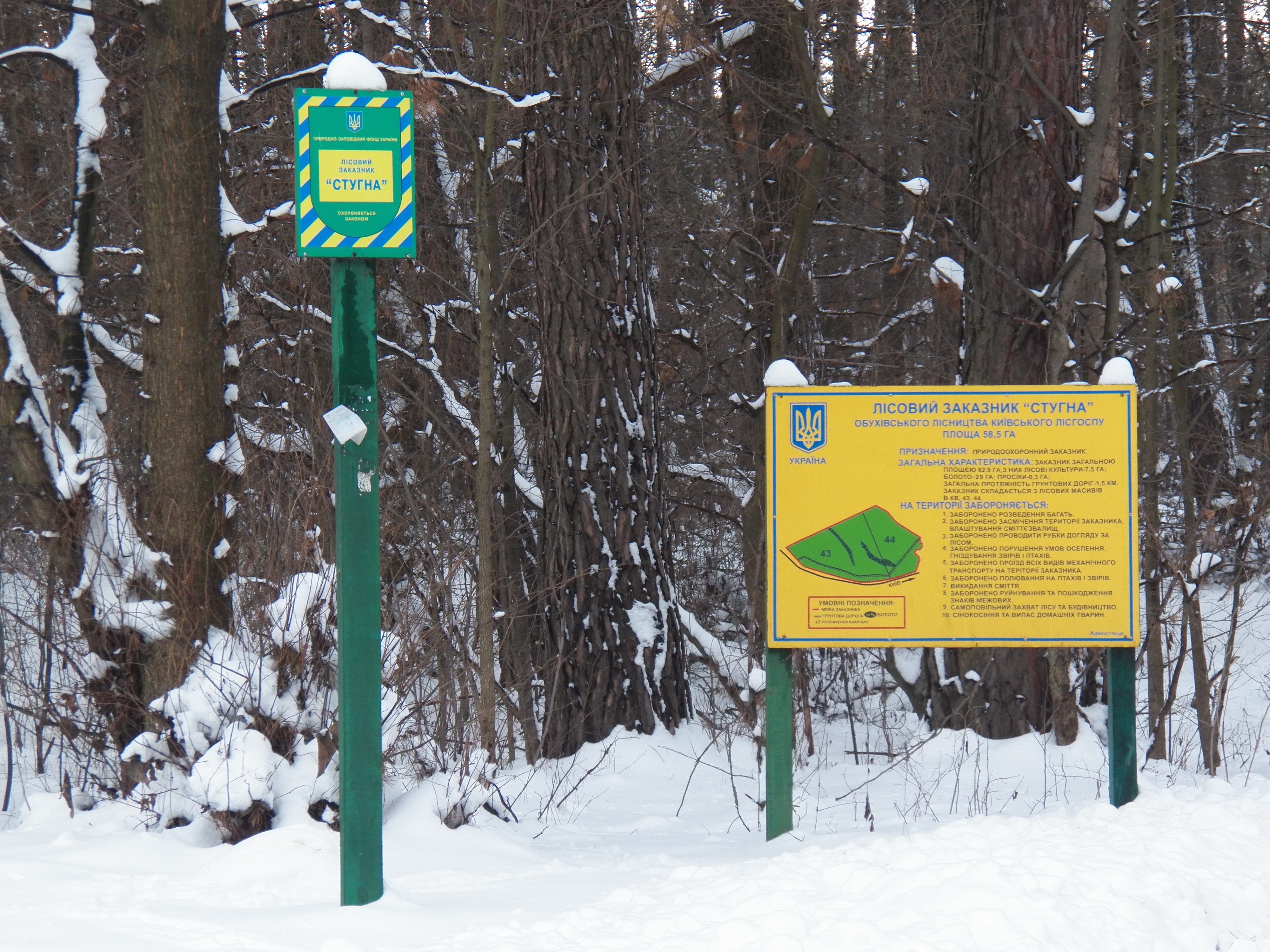 «Стугна», Обухівський район, Українська міська рада